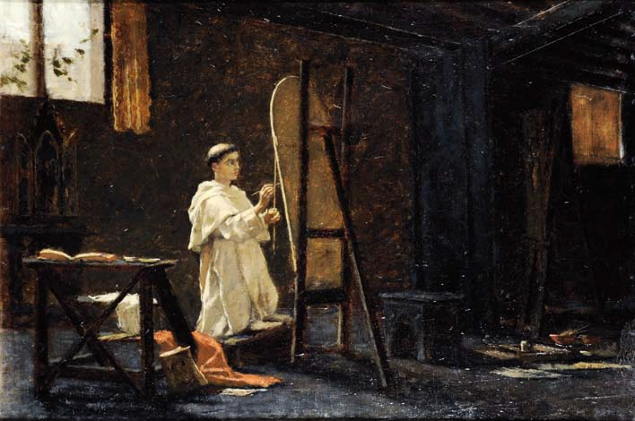 Francesco Filippini. La cella del Beato Angelico (1880)